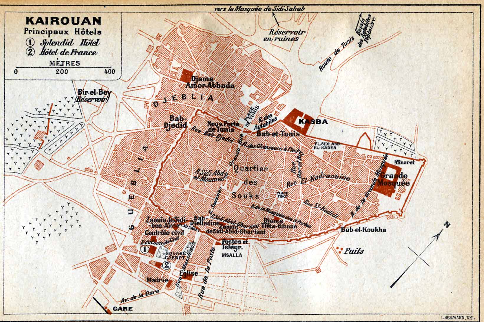 Plan de Kairouan en 1916, Tunisie